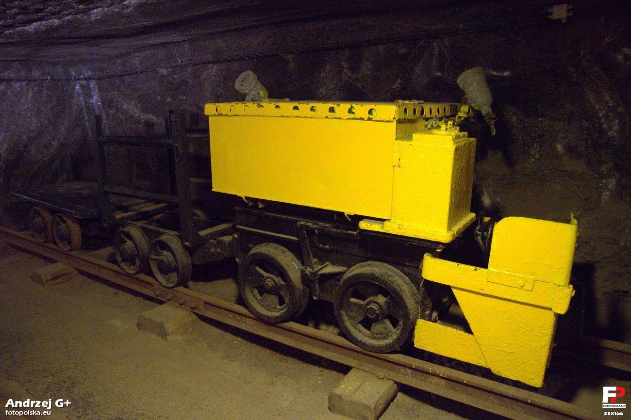 Akumulatorowa lokomotywa typu Karlik pochodząca z lat 50-tych XX w.